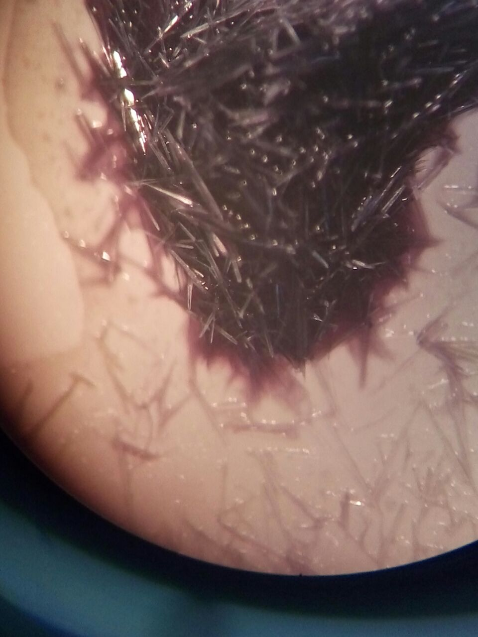 Cristales vistos a microscopio